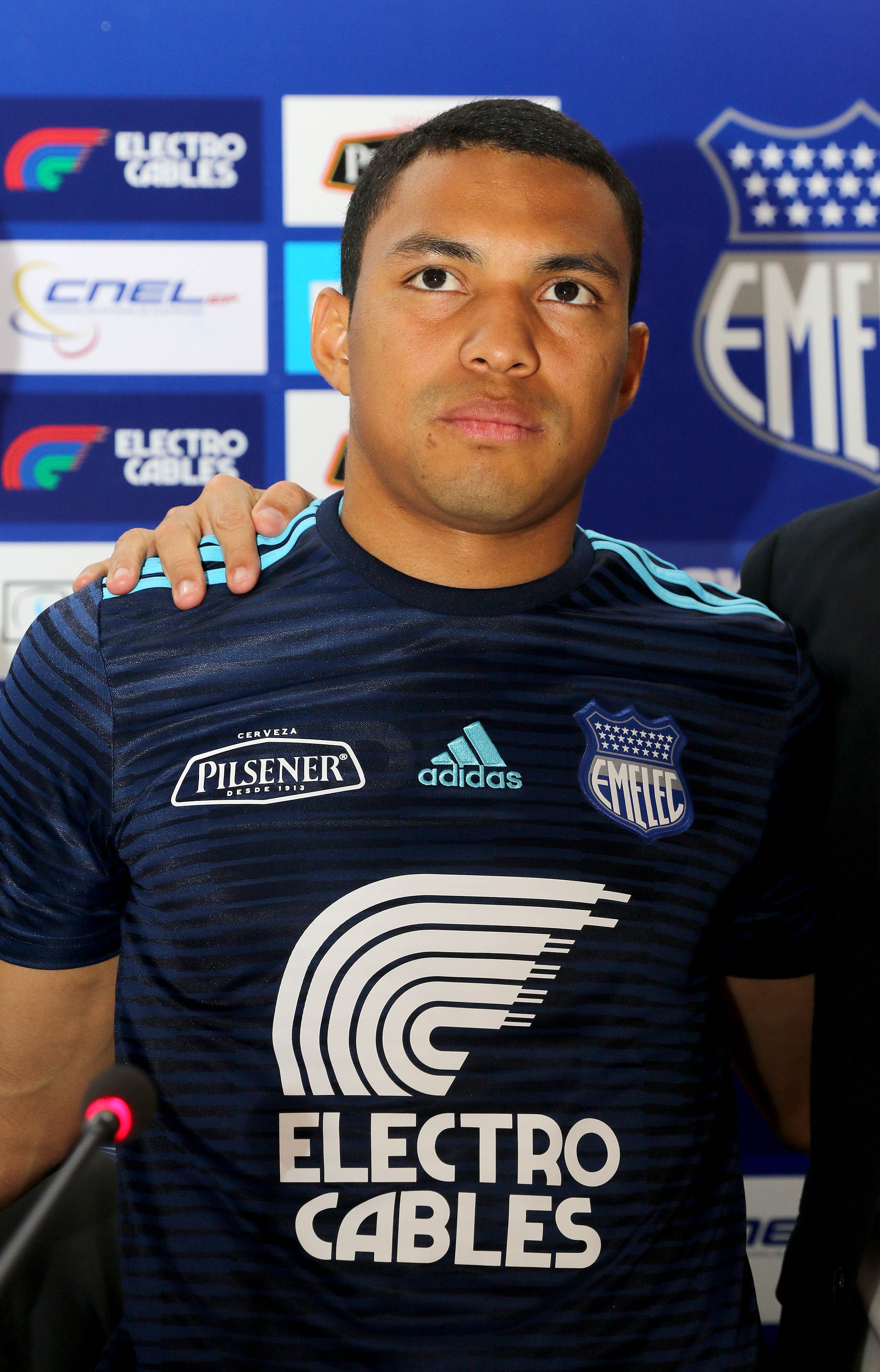 Guayaquil, miércoles 28 de febrero del 2018 (Andes).-En la sala de prensa del Estadio George Capwell fue presentado oficialmente Jefferson Montero, nuevo refuerzo de Emelec Foto:Andes/César Muñoz